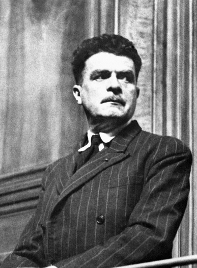 Joseph Lécussan lors de son procès à Lyon (25 mai 1946).